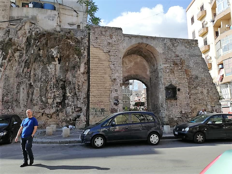 Arco, prospetto verso piazza del Carminello.